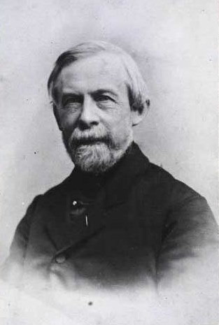 Otto Frederik Müller (née: Friedrich Otto Müller) (1807-1882), Danish supreme court judge